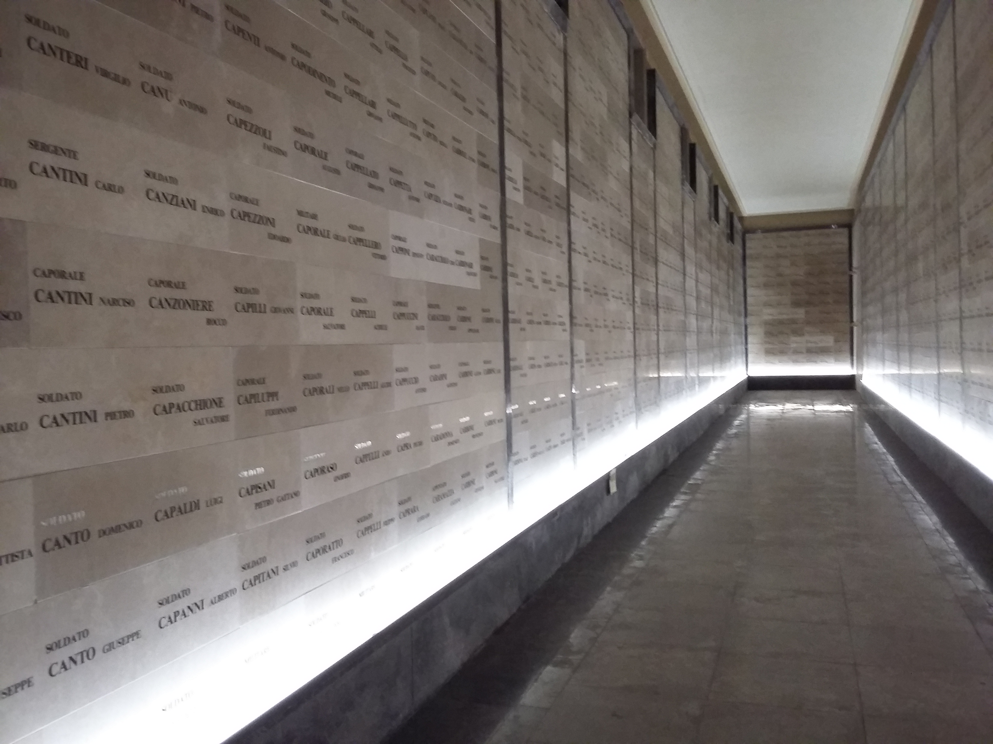 Tombe di militari nella cripta